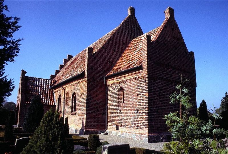 Olstrup Kirke i Danmark. Olstrup kirke